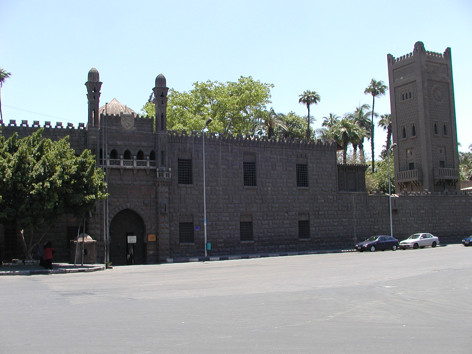 Entrée du Palais Al-Manyal, (Le Caire, Égypte).